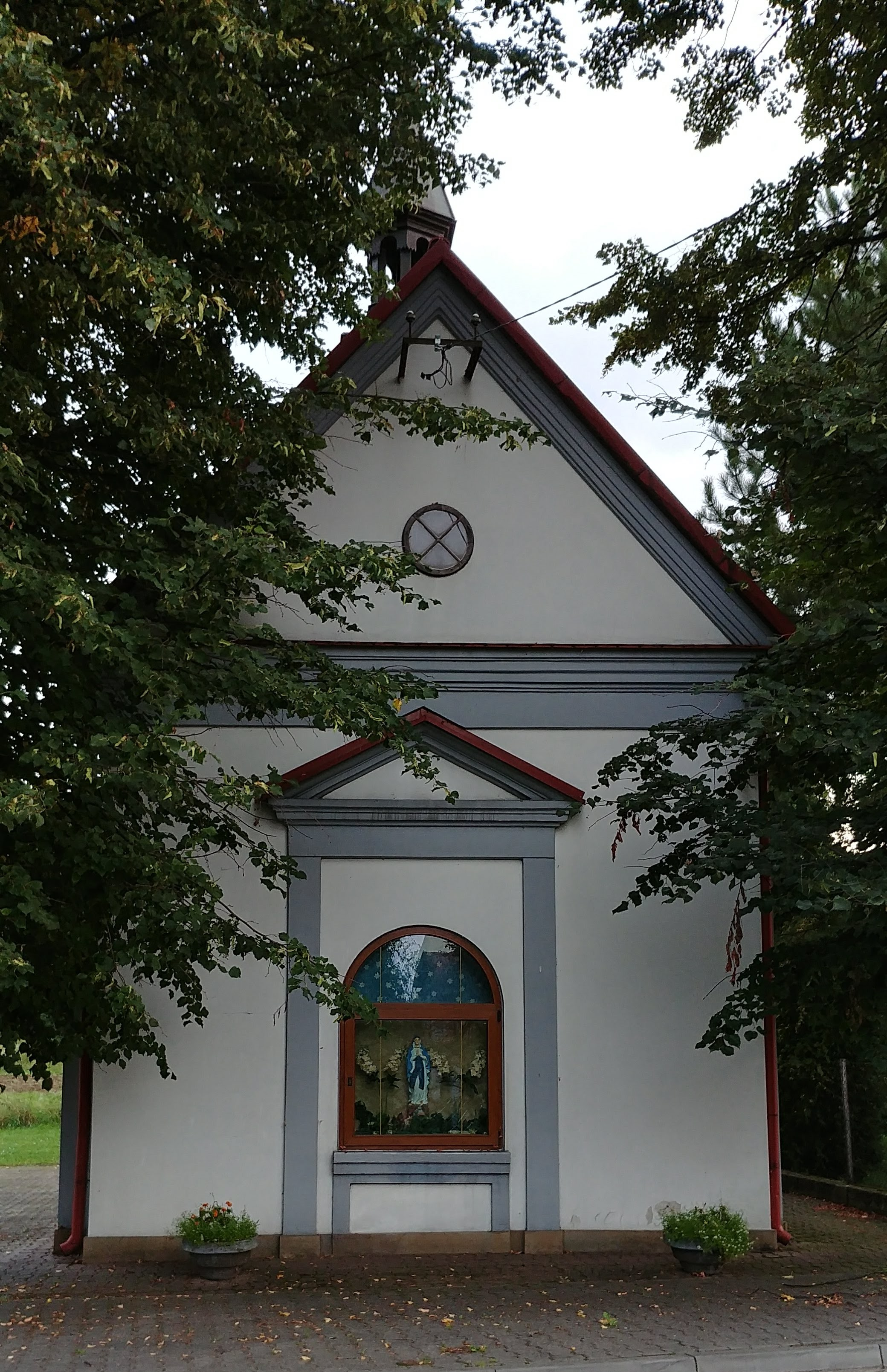 Kaplica NMP z Lourdes w Chodenicach.